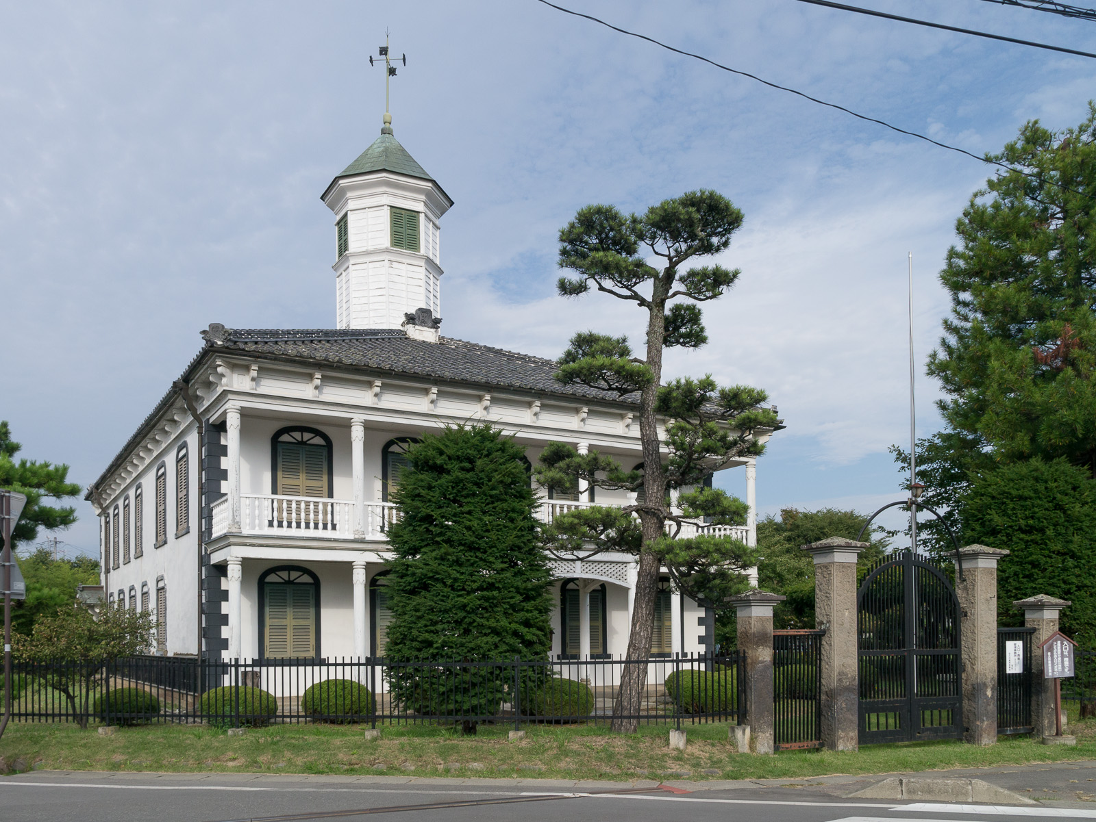 旧中込学校、長野県佐久市。